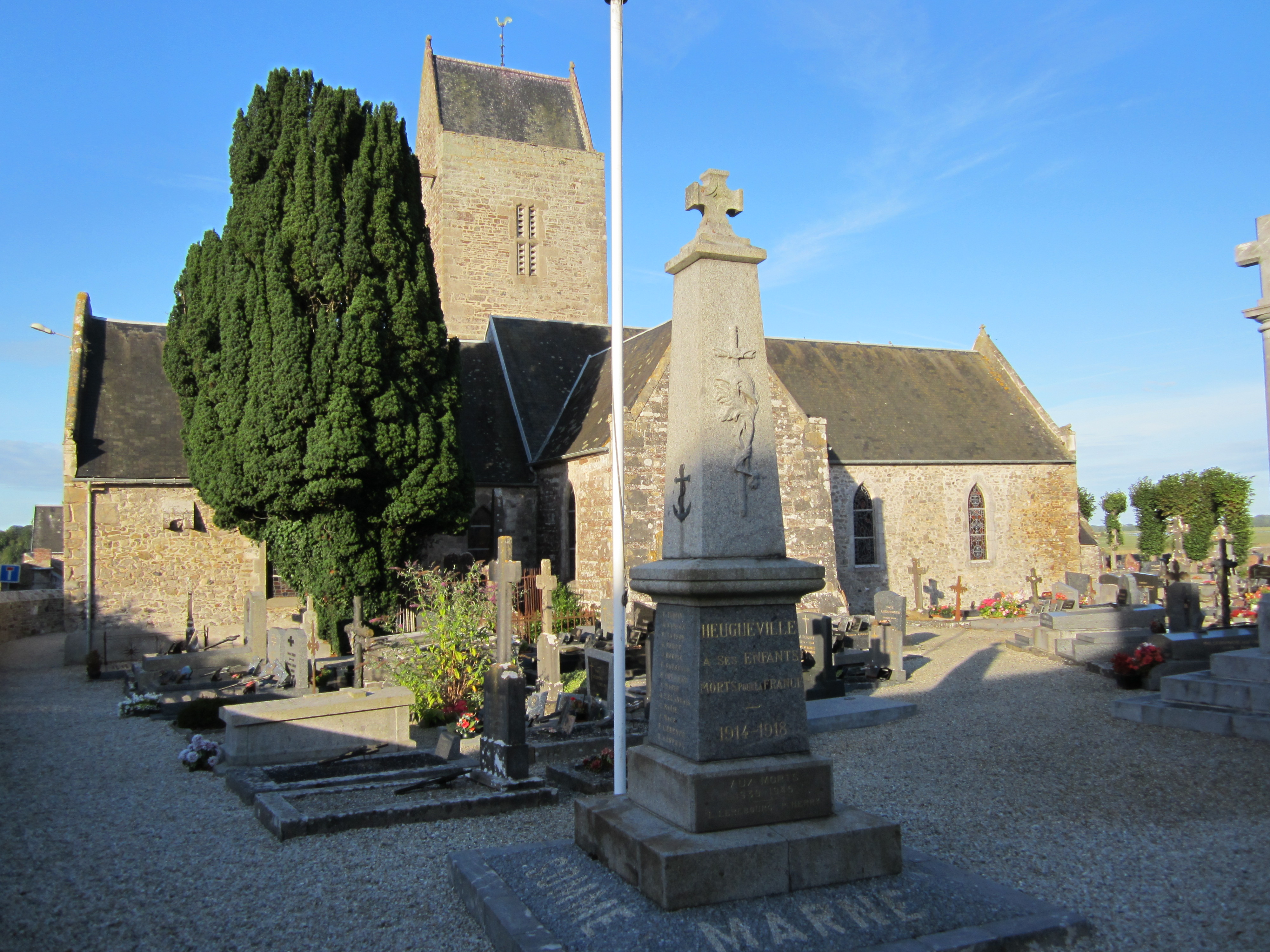 Église Saint-Pierre d'Heugueville-sur-Sienne